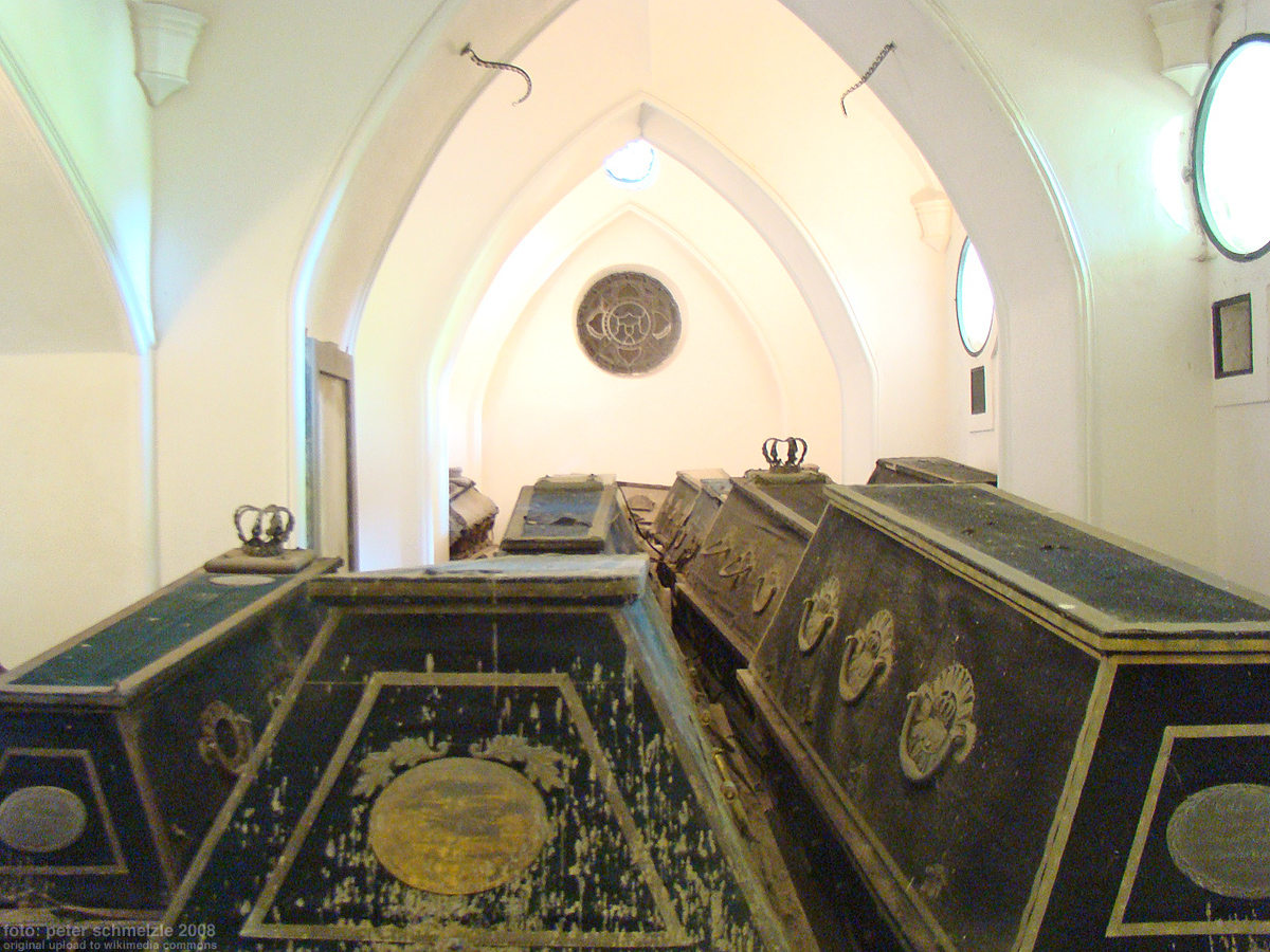 Gruft des Hauses Mecklenburg-Strelitz in der Johanniterkirche in Mirow